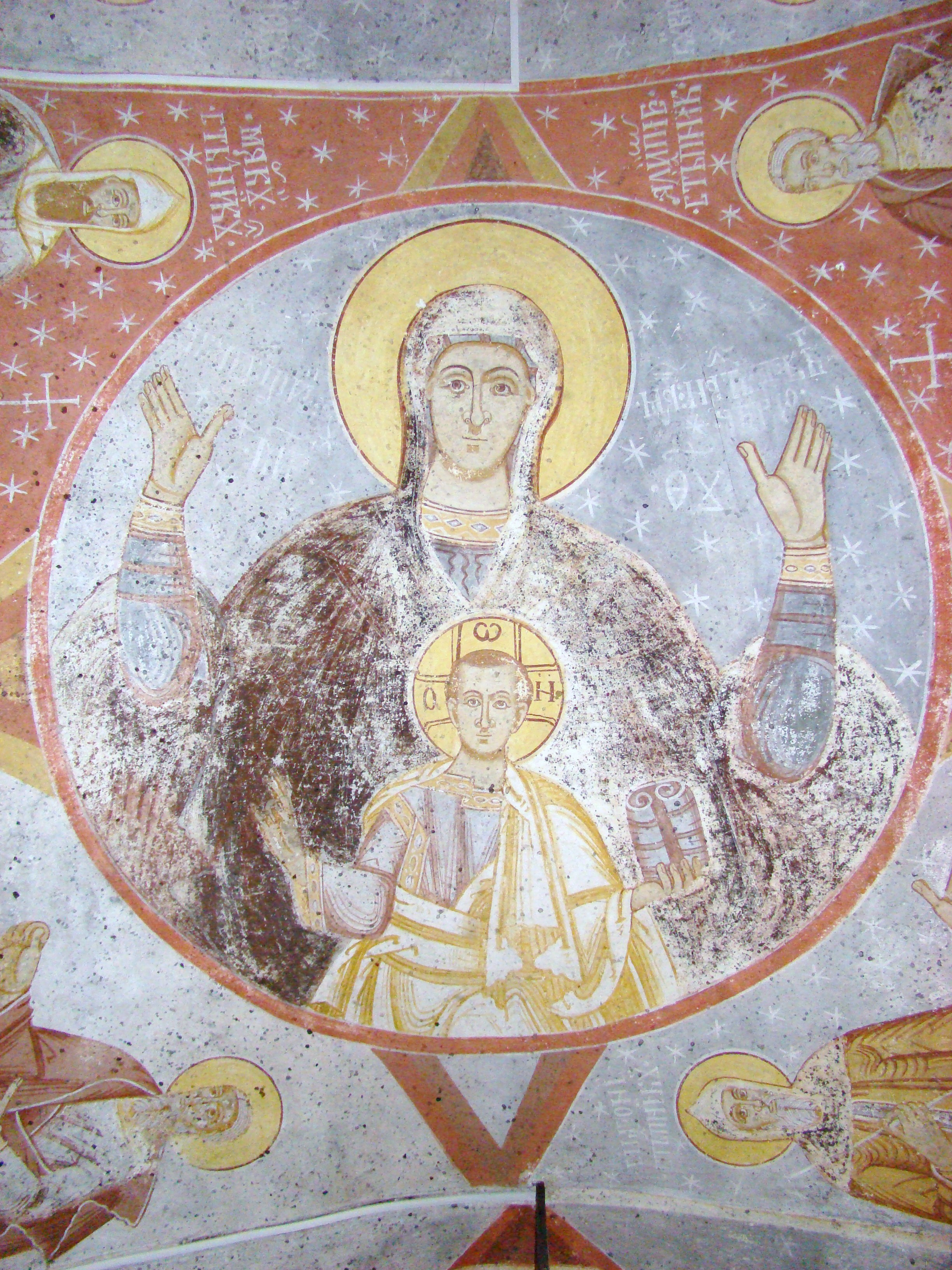 Biserica "Înălţarea Domnului" , sat NUCŞOARA; comuna SĂLAŞU DE SUS